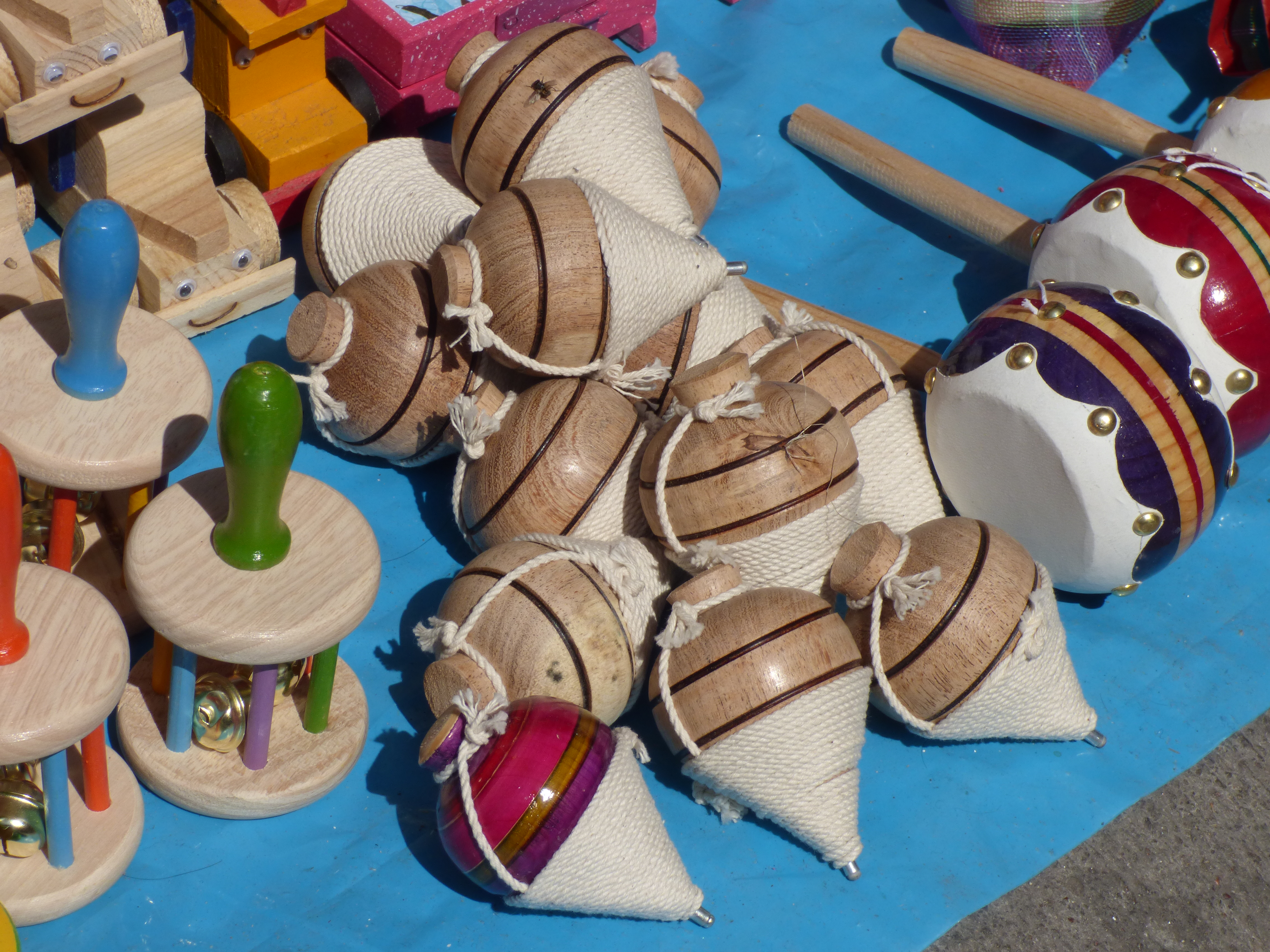 Juguetes en San Juan de los Lagos, Jalisco, México